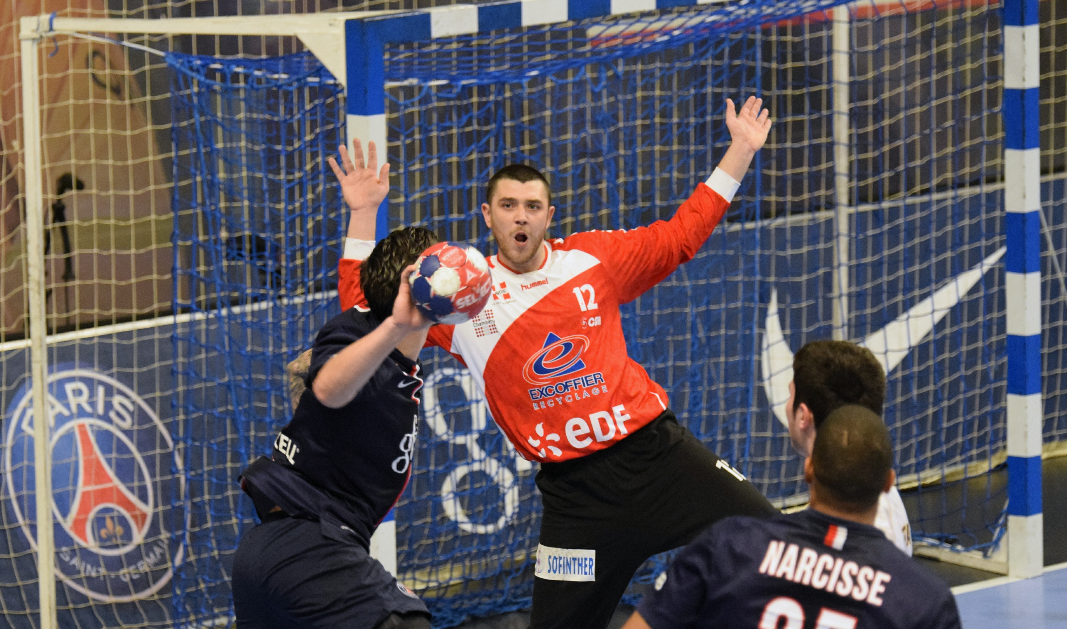 Yann Genty gardien de but de l'équipe de Chambéry Savoir Handball. Le 18 février 2015 lors de la rencontre de la 16e journée du championnat de France de D1.